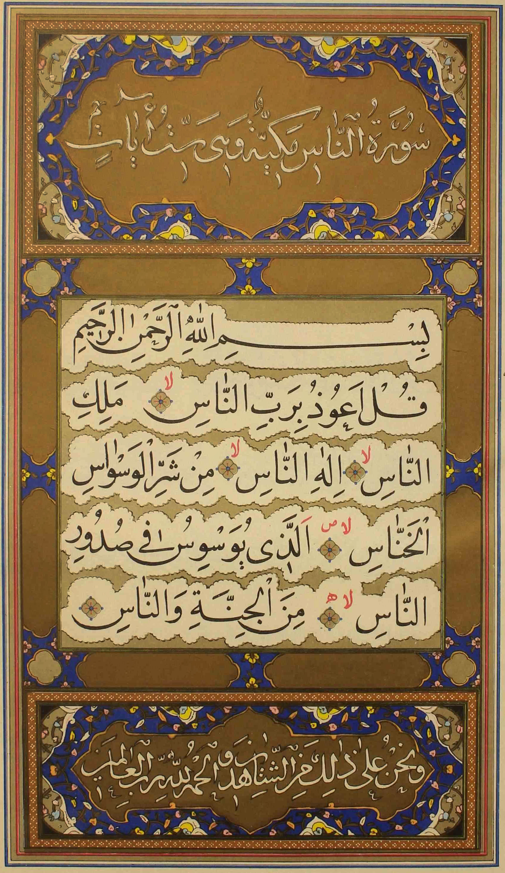 کتابت: 1117 ه.ق، اواخر دوره صفوی نگاه‌داری‌شده در کتابخانهٔ کاخ گلستان معروف به قرآن آریامهری یا پهلوی